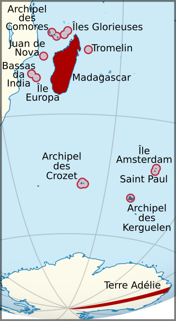 Colonie de Madagascar et dépendances en 1930